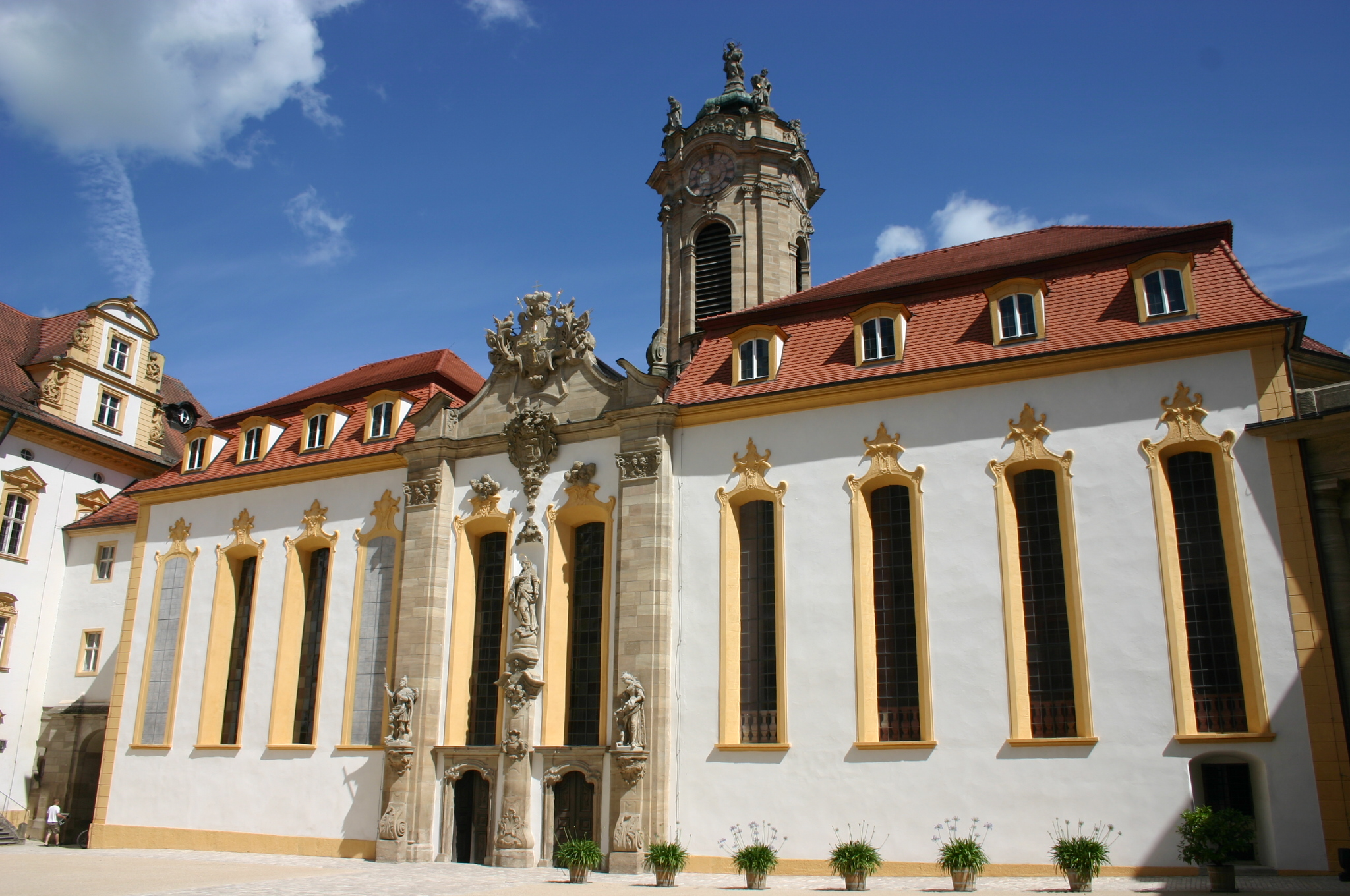 Hofseite der Schlosskirche